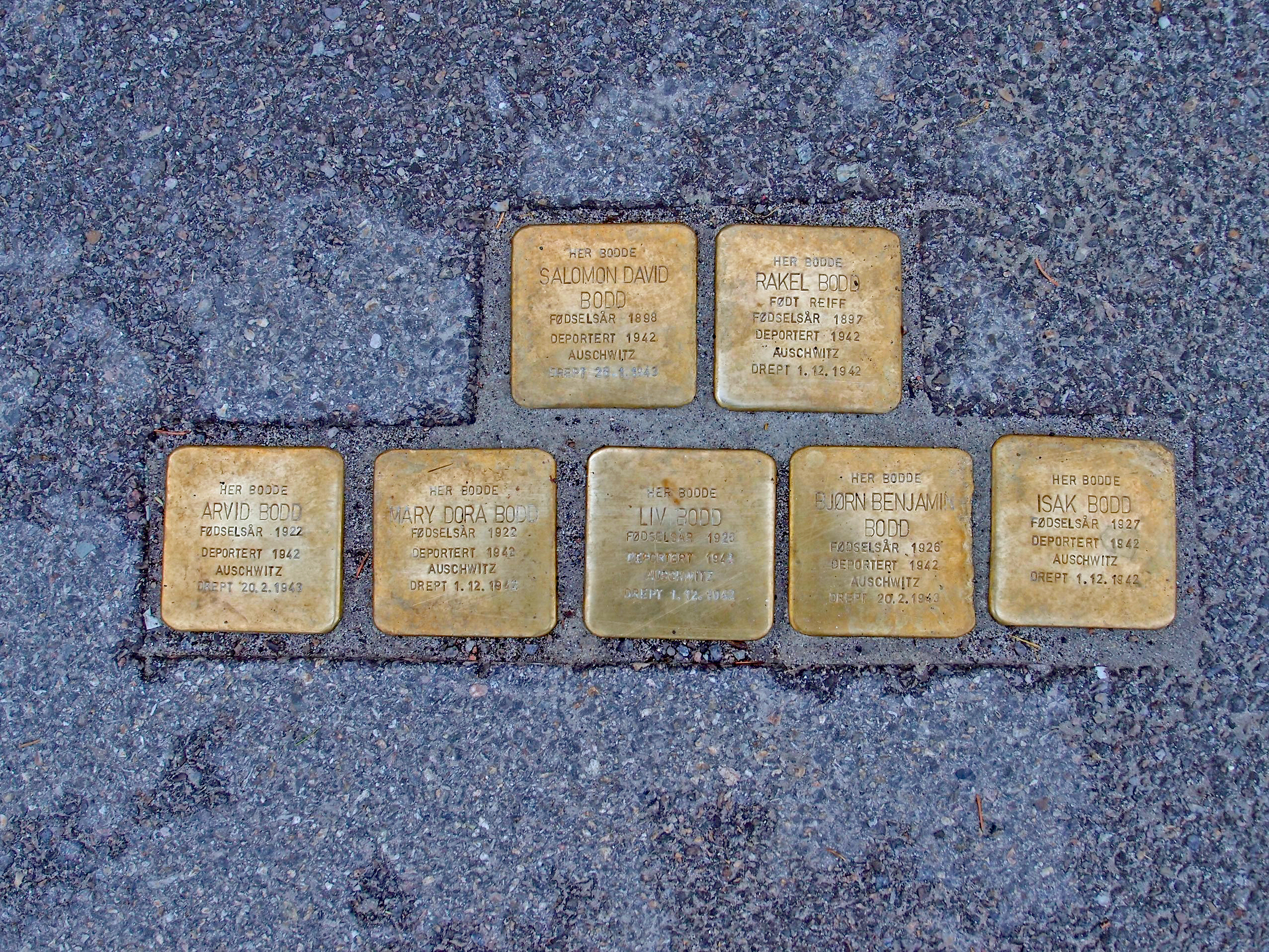 Snublesteinar i Haneborgveien i Lørenskog til minne om den jødiske familien Bodd som vart deporterte til og drepne i Auschwitz i 1942.